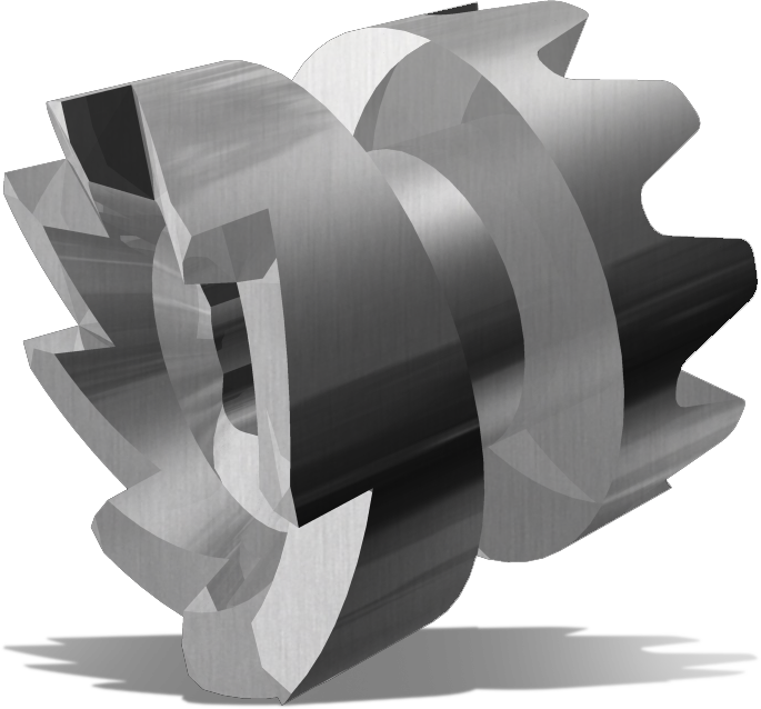 Pignon coulant, mécanisme horloger permettant de remonter le poids des aiguilles